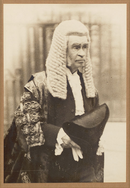 Herbert Cozens-Hardy, 1st Baron Cozens-Hardy (1838-1920)